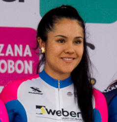 Camila Valbuena en la presentación del Weber Shimano Ladies Power en la Vuelta a Colombia Femenina 2017